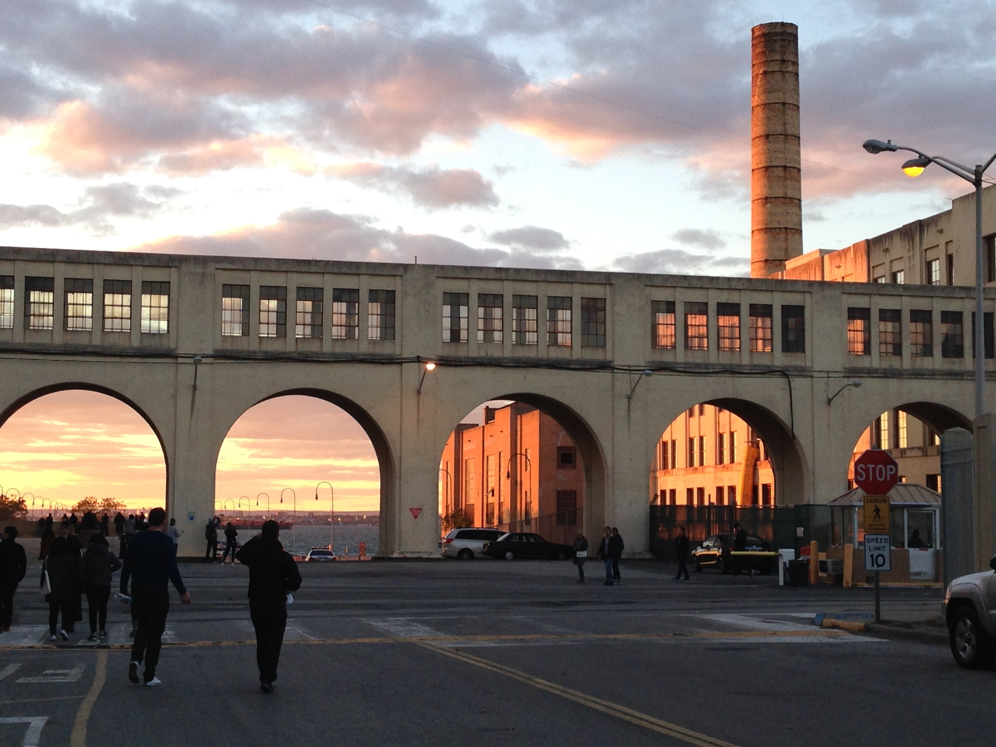 Site: BAT